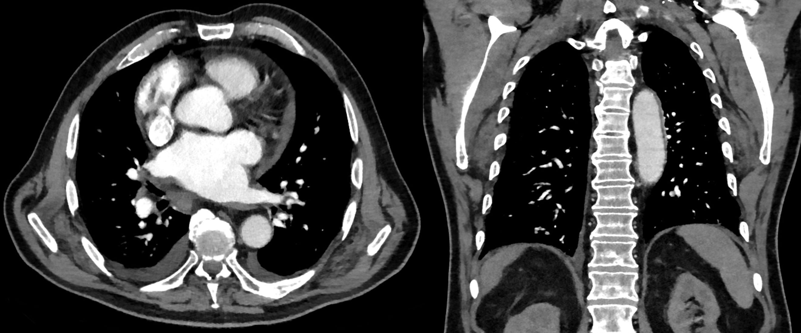 Computertomographie eines Elastofibroma dorsi bei einem 75-jährigen beidseits weitgehend symmetrisch unter dem M. serratus anterior. Man erkennt neben unscharfen, weichteildichten auch fettige Anteile. Die Lage ist klassisch. Linkes Bild axial, rechts koronar.